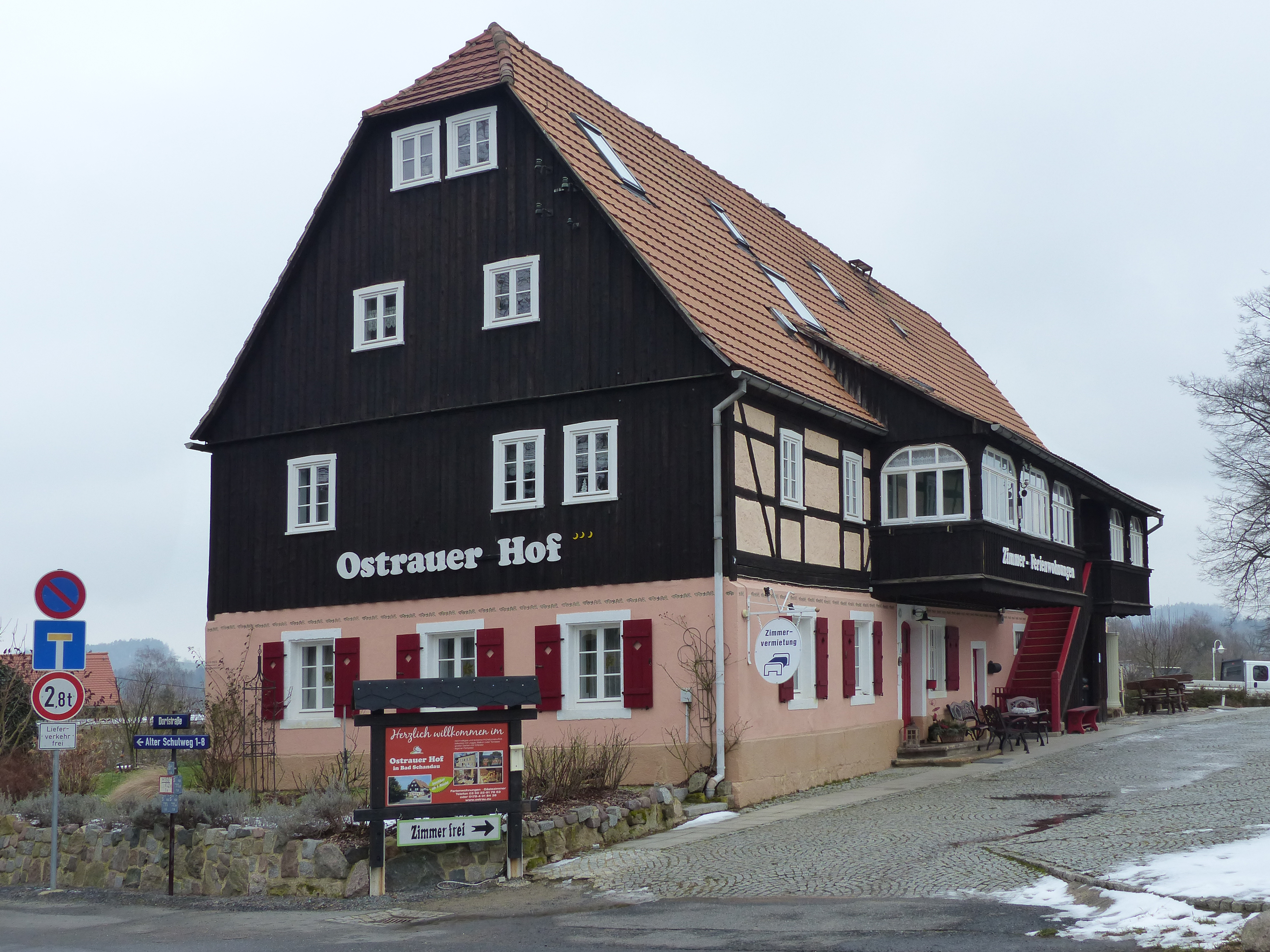 Ostrauer Hof, denkmalgeschütztes Gebäude, Dorfstraße 1, Ostrau, Bad Schandau